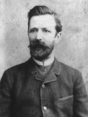 Димитрије Нешић (1836-1904)